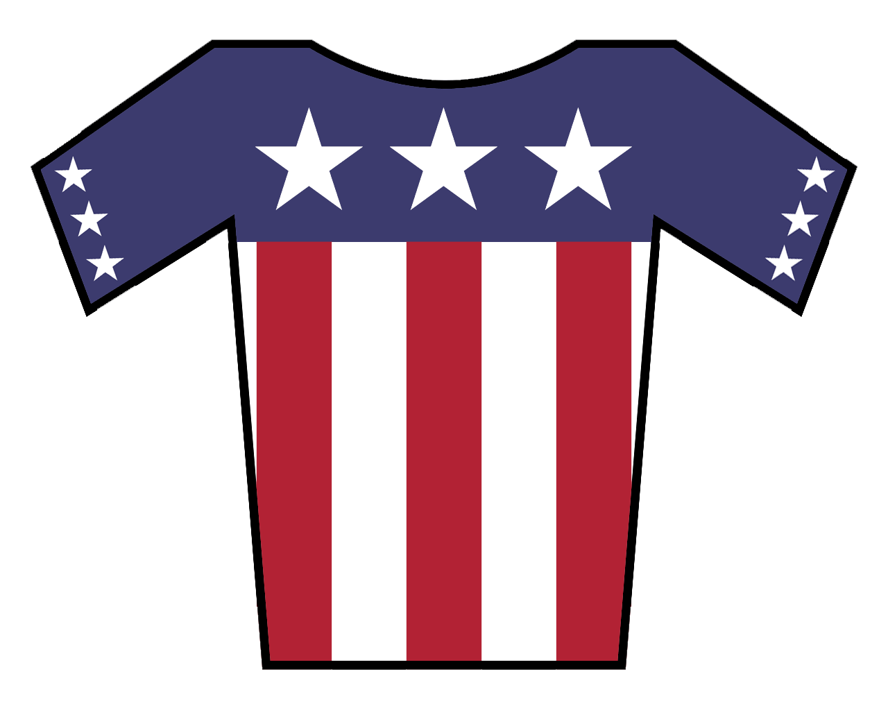 Maillot de Estados Unidos